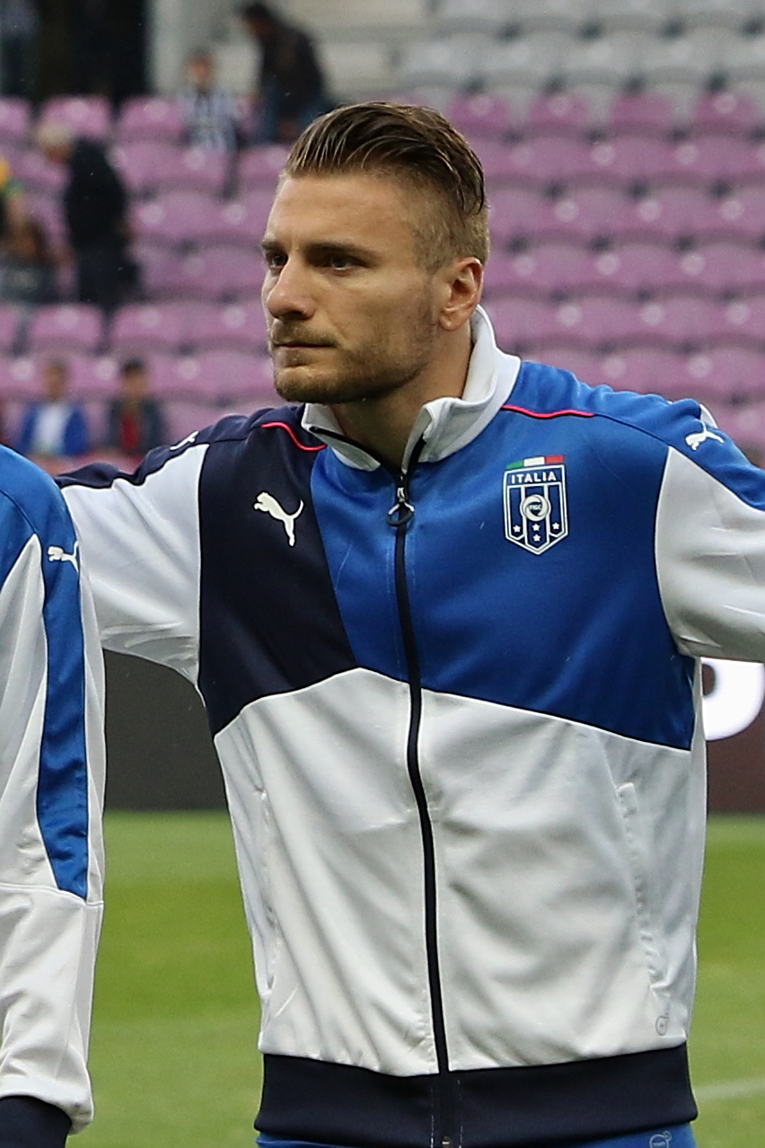 20150616 - Portugal - Italie - Genève - Ciro Immobile